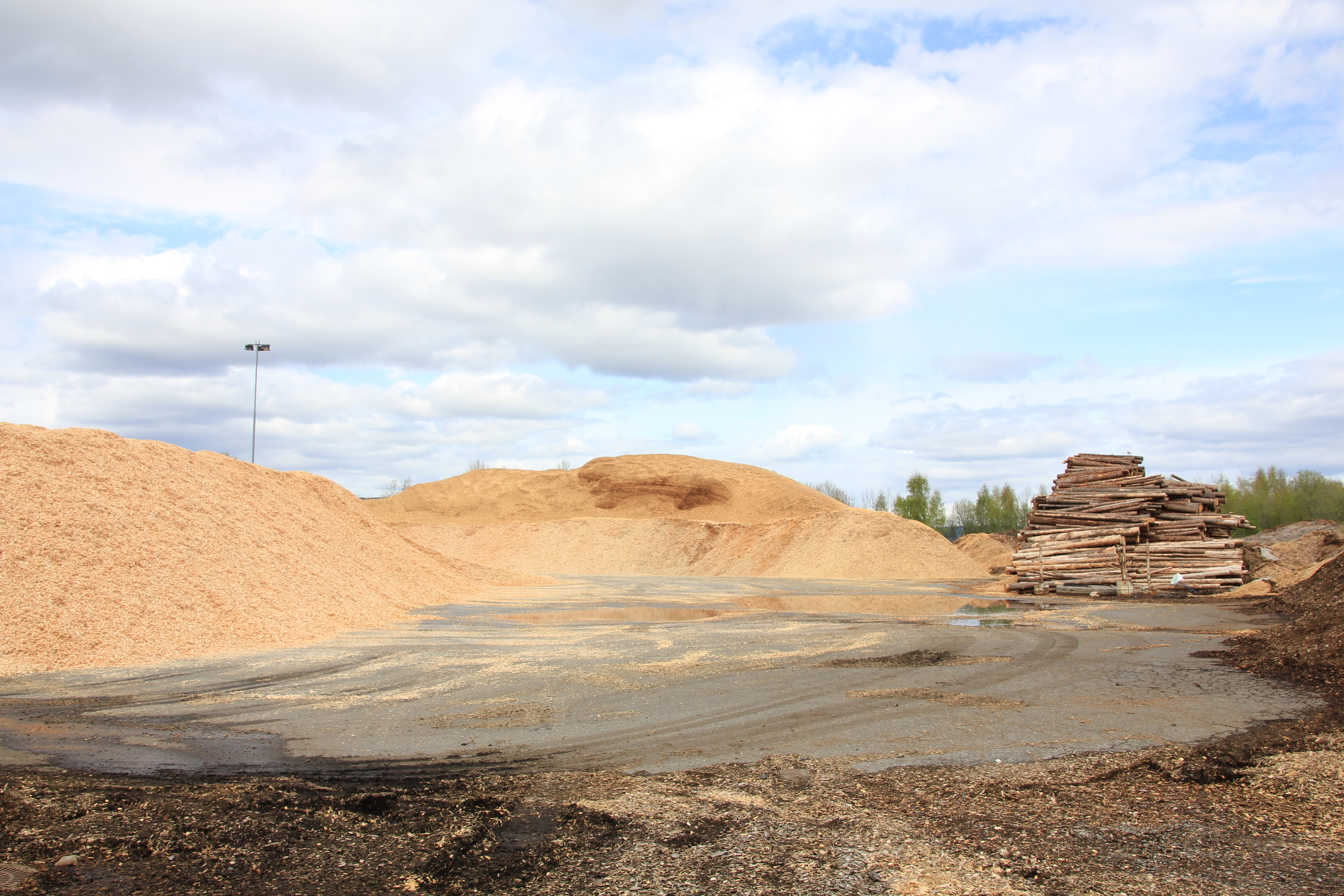 Flis på Huntonstranda. Gjøvik, Norway.